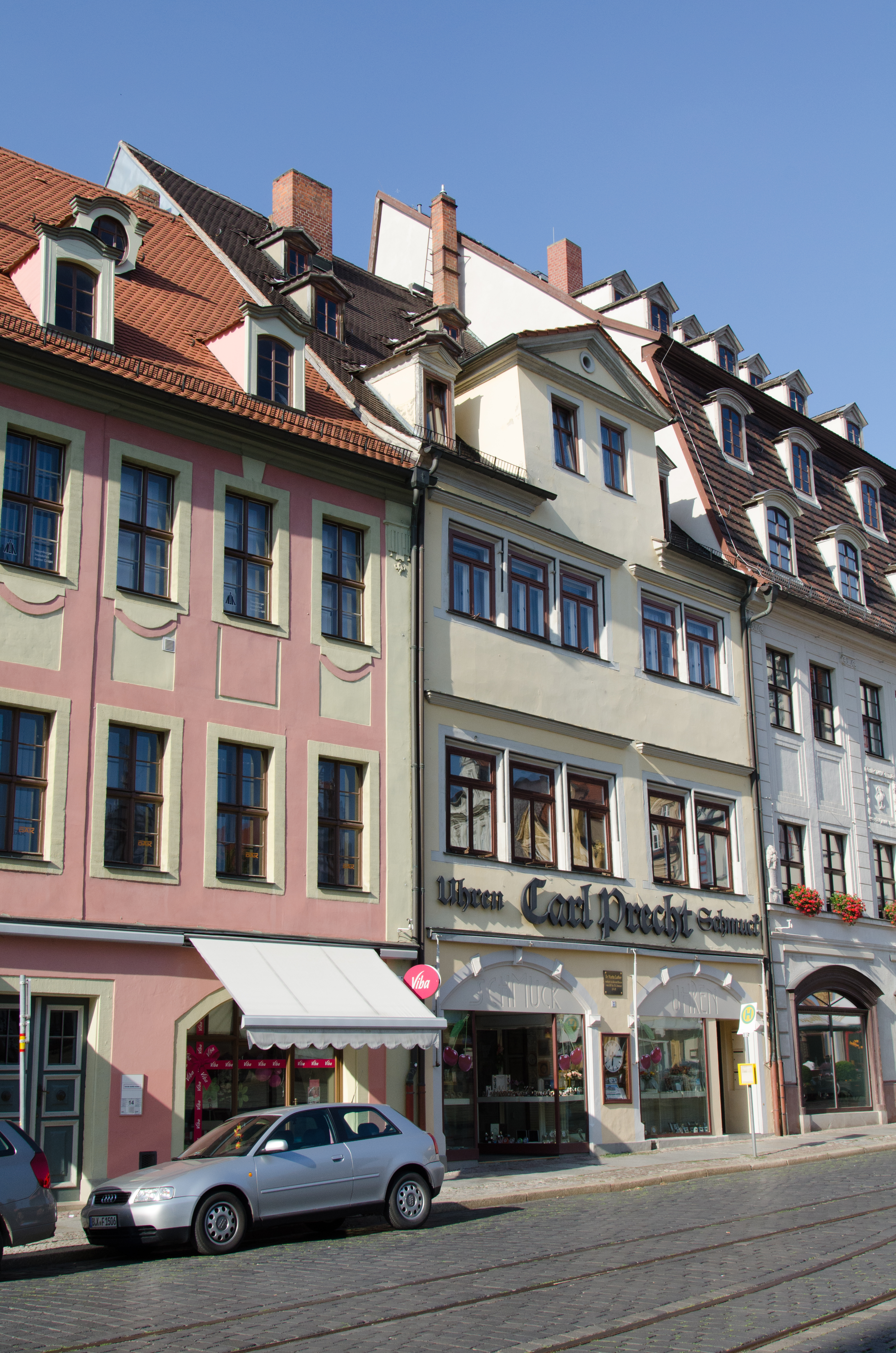 Naumburg, Markt 13